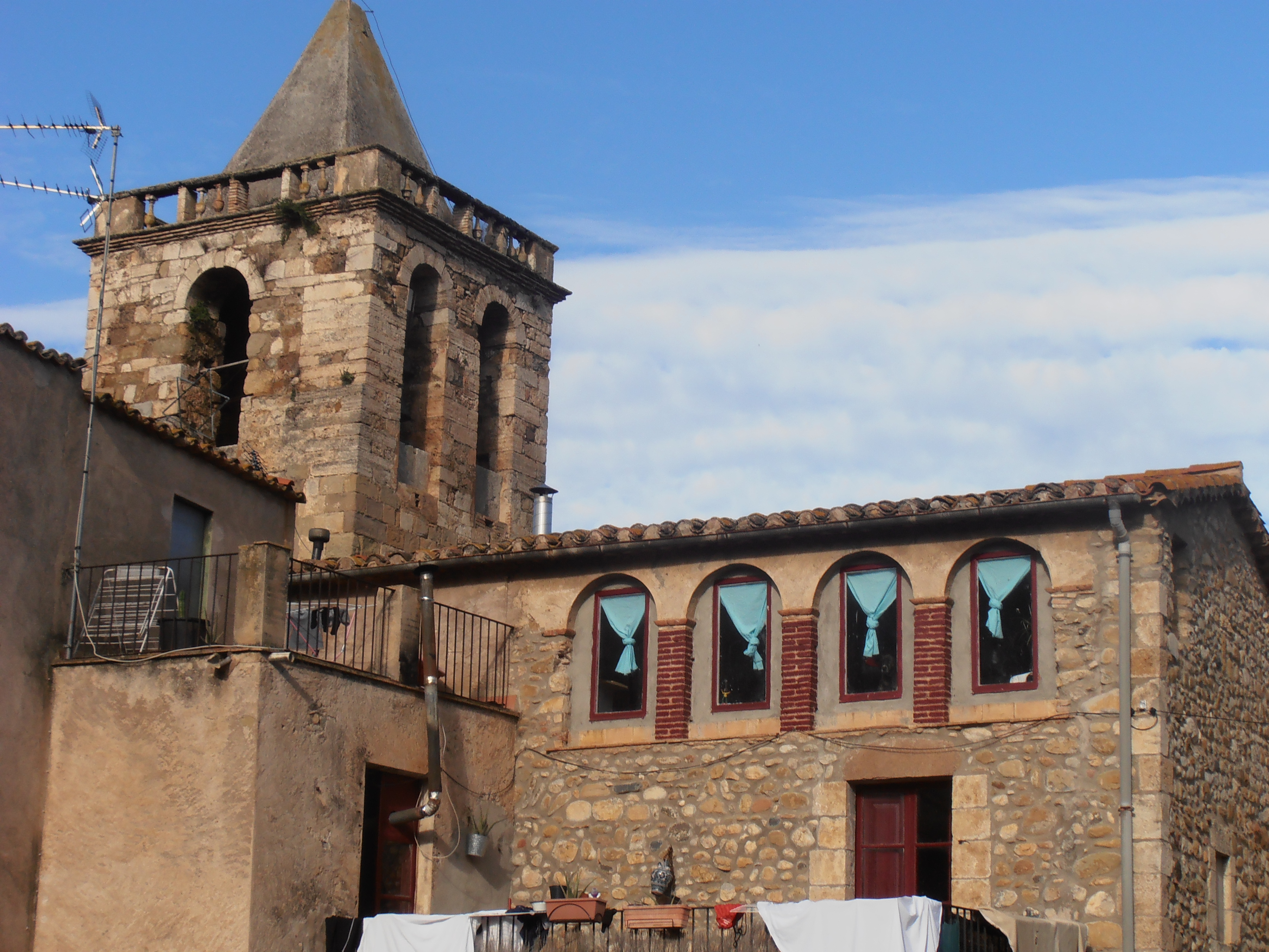 Campanar de Vilert amb casa pairal al davant